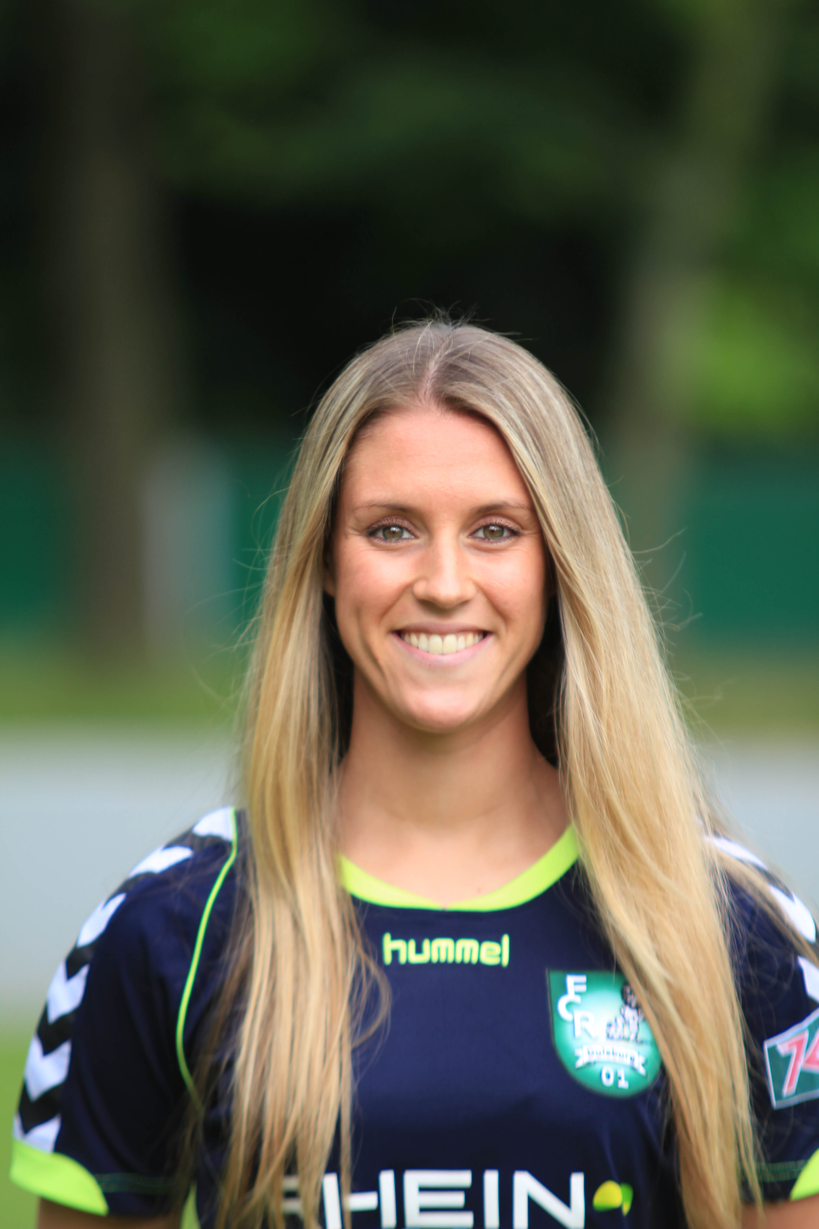 Nina Windmüller, FCR 2001 Duisburg